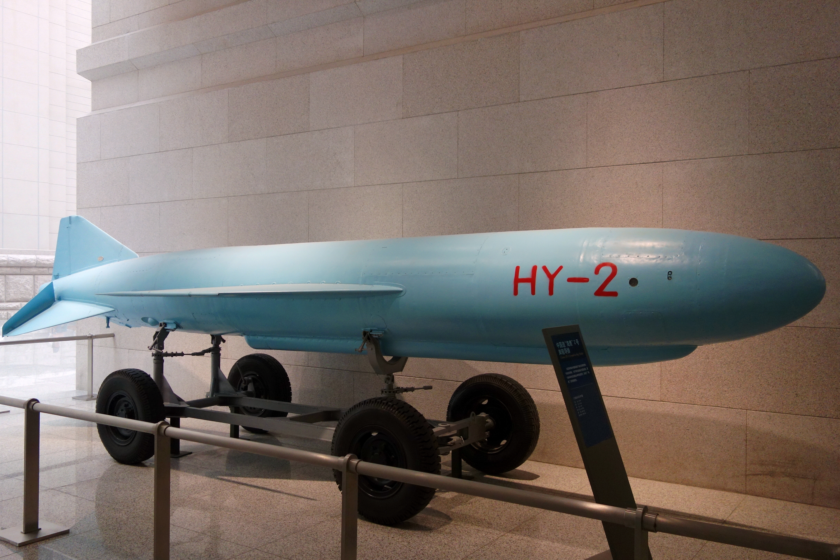 “海鹰”2号岸舰导弹，拍摄于中国人民革命军事博物馆。